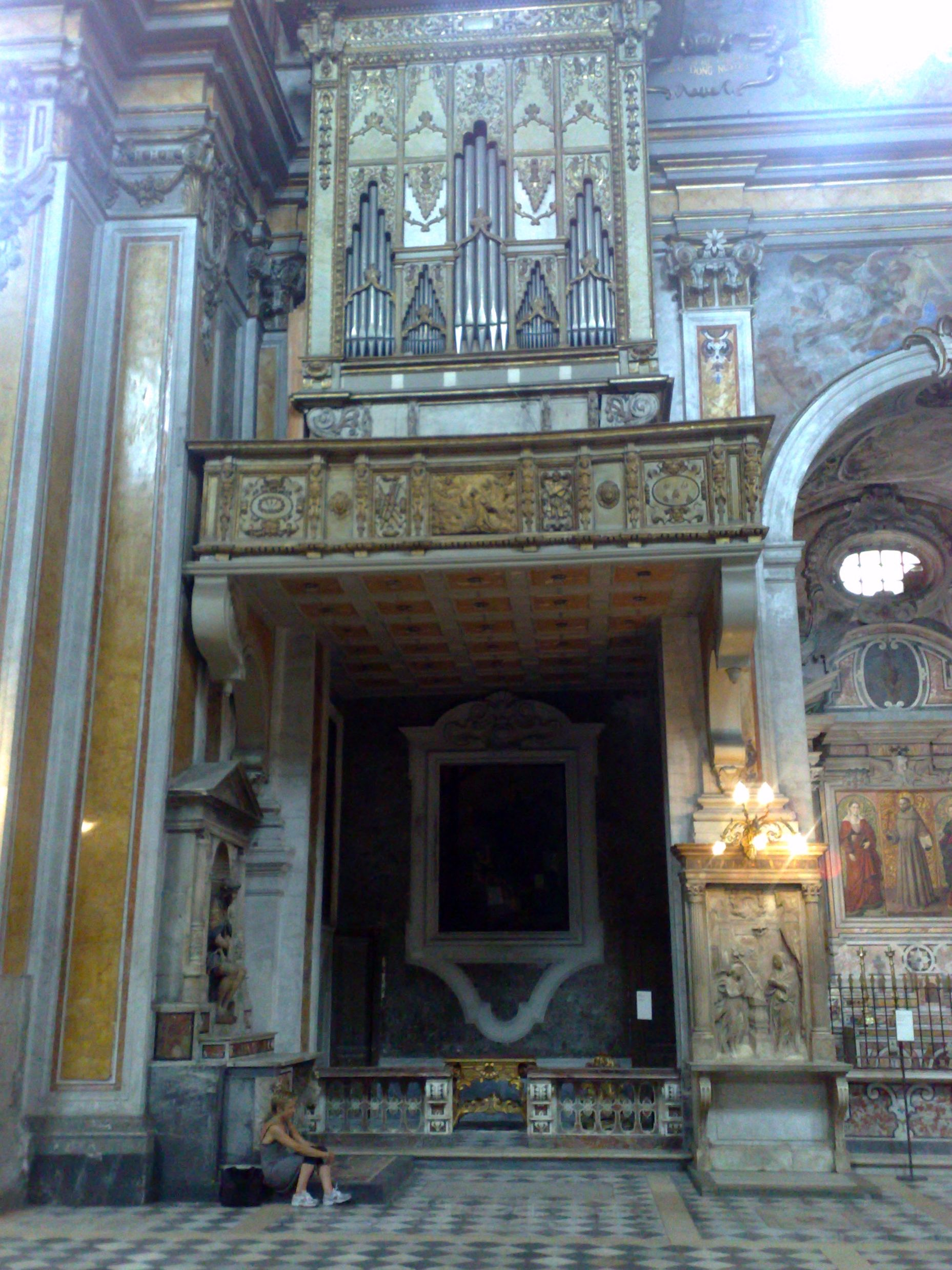 Organo della chiesa Santa Maria La Nova a Napoli.